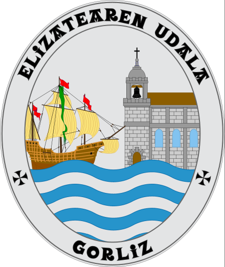 Gorlizko amarria